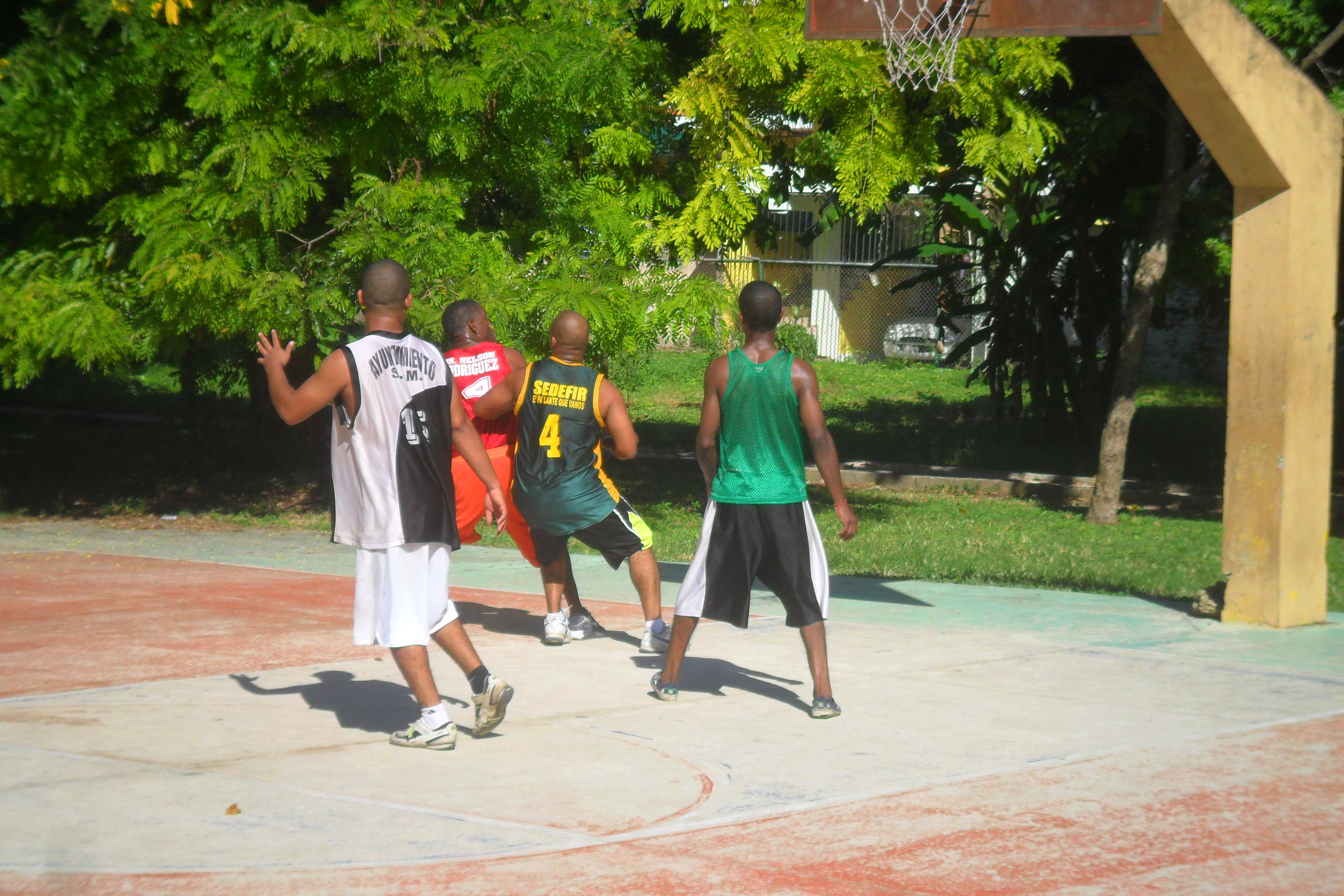 Jóvenes del Barrio Sarmiento de San Pedro de Macorís practicando baloncesto